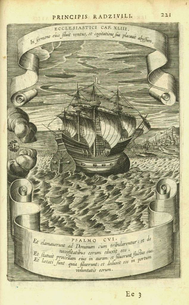 Беларуская (тарашкевіца): Ілюстрацыя з "Пэрэгрынацыі" М. К. Радзвіла